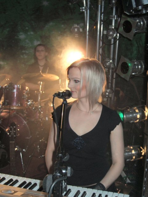 Sirkku, Keyboarderin der Band Indica